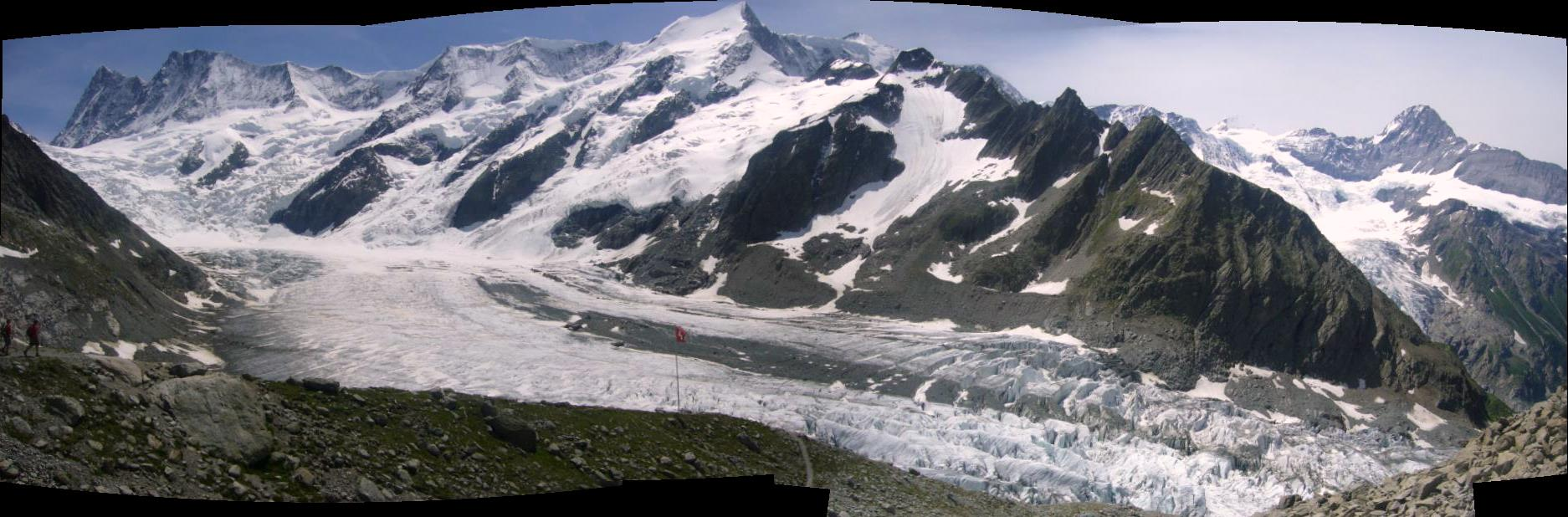 Panorama Unterer Grindelwaldgletscher